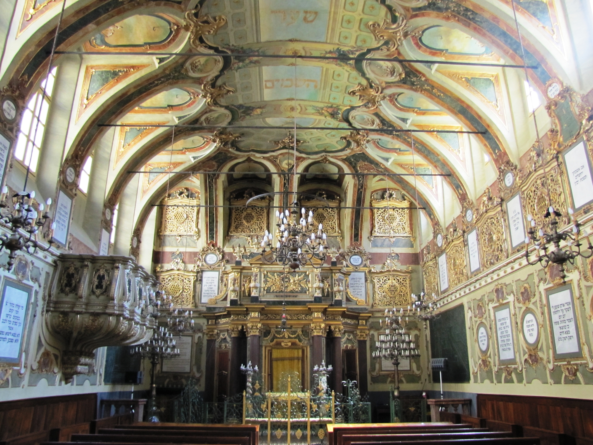 Casale Monferrato Synagogue